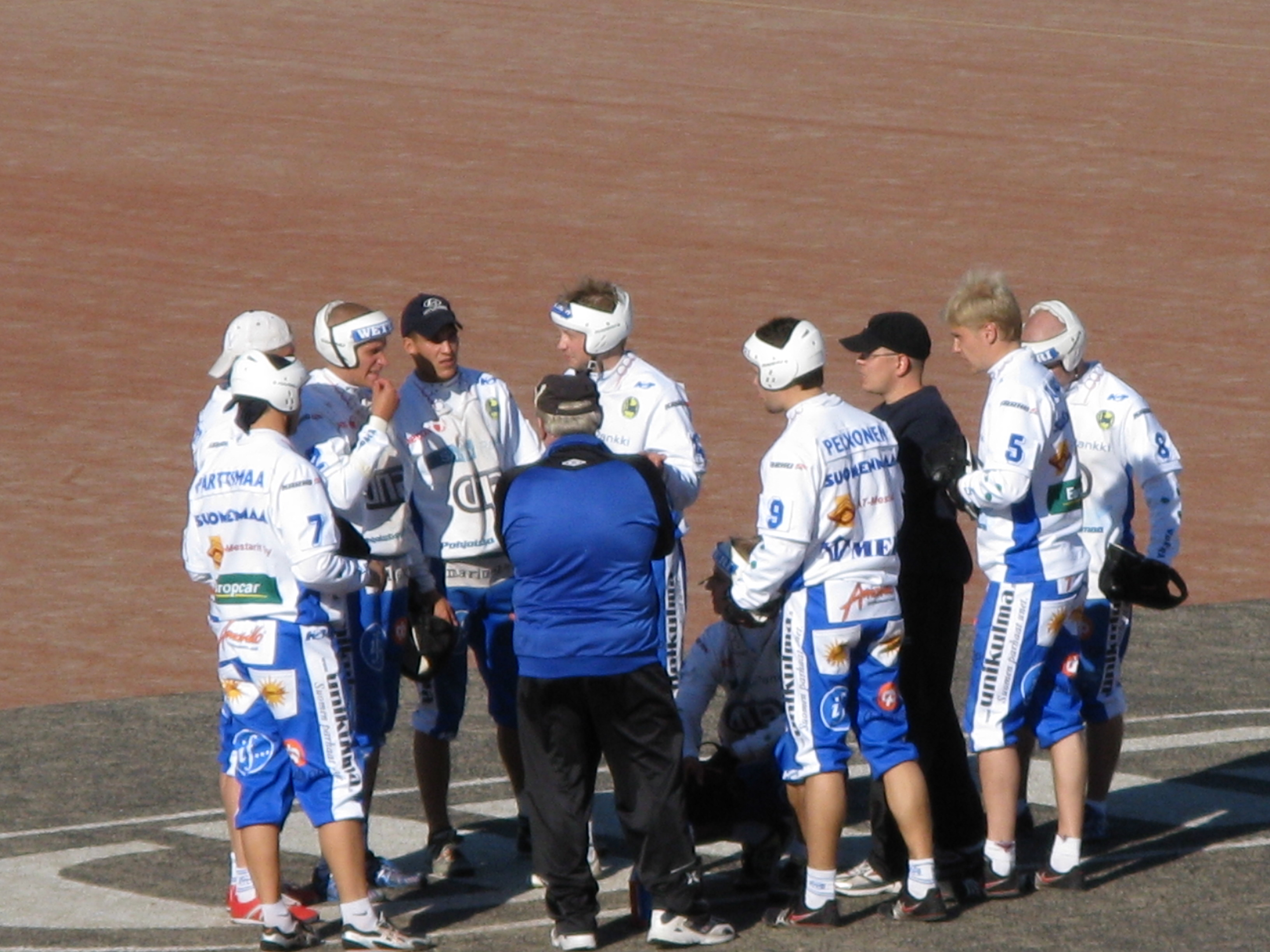 Oulun Lipon ulkokenttä aikalisällä